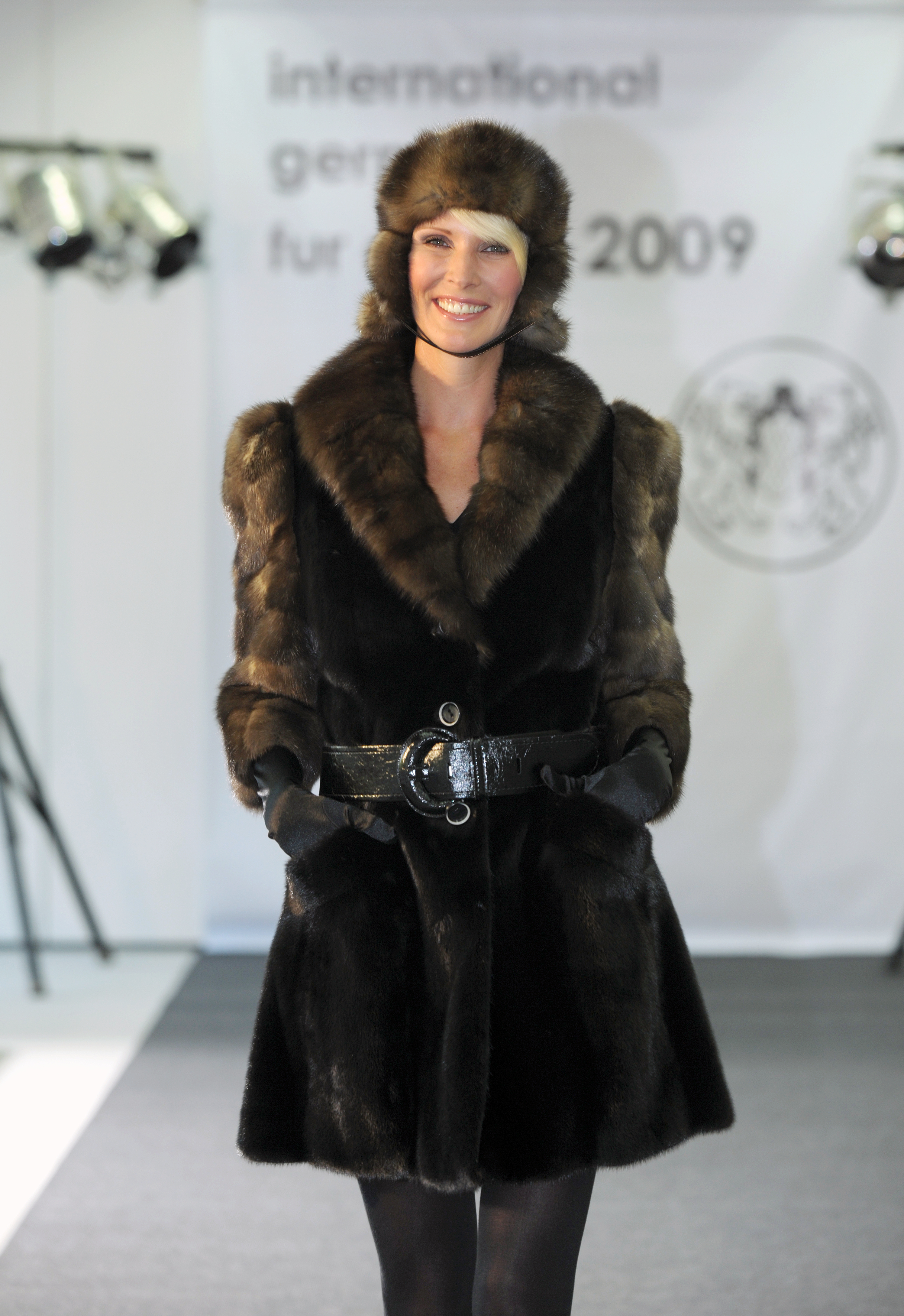 International German Fur Award 2009 des Kürschnerhandwerks.